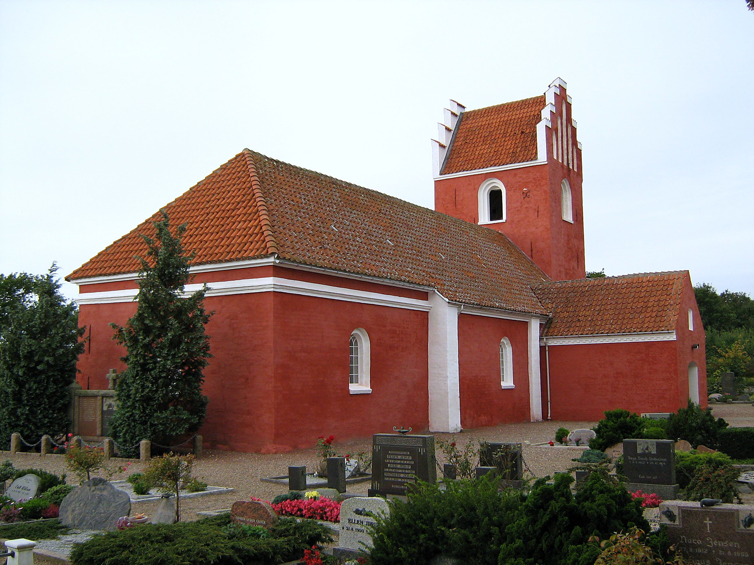 Vesterø Ny Kirke på Læsø